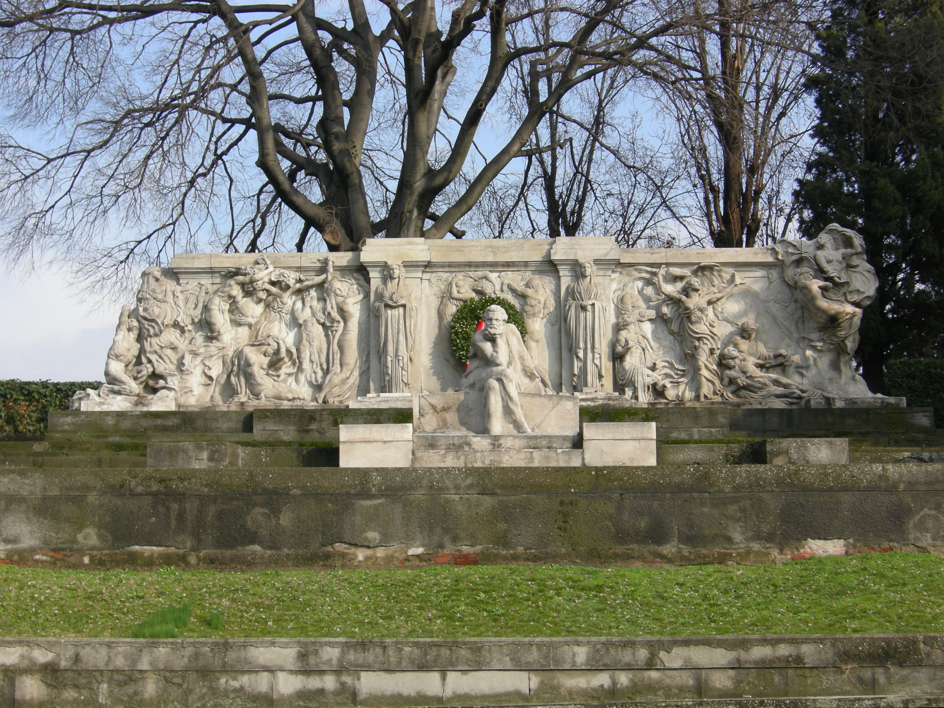 Leonardo Bistolfi, monumento a Giosuè Carducci, marmo,(1908-1928), Bologna